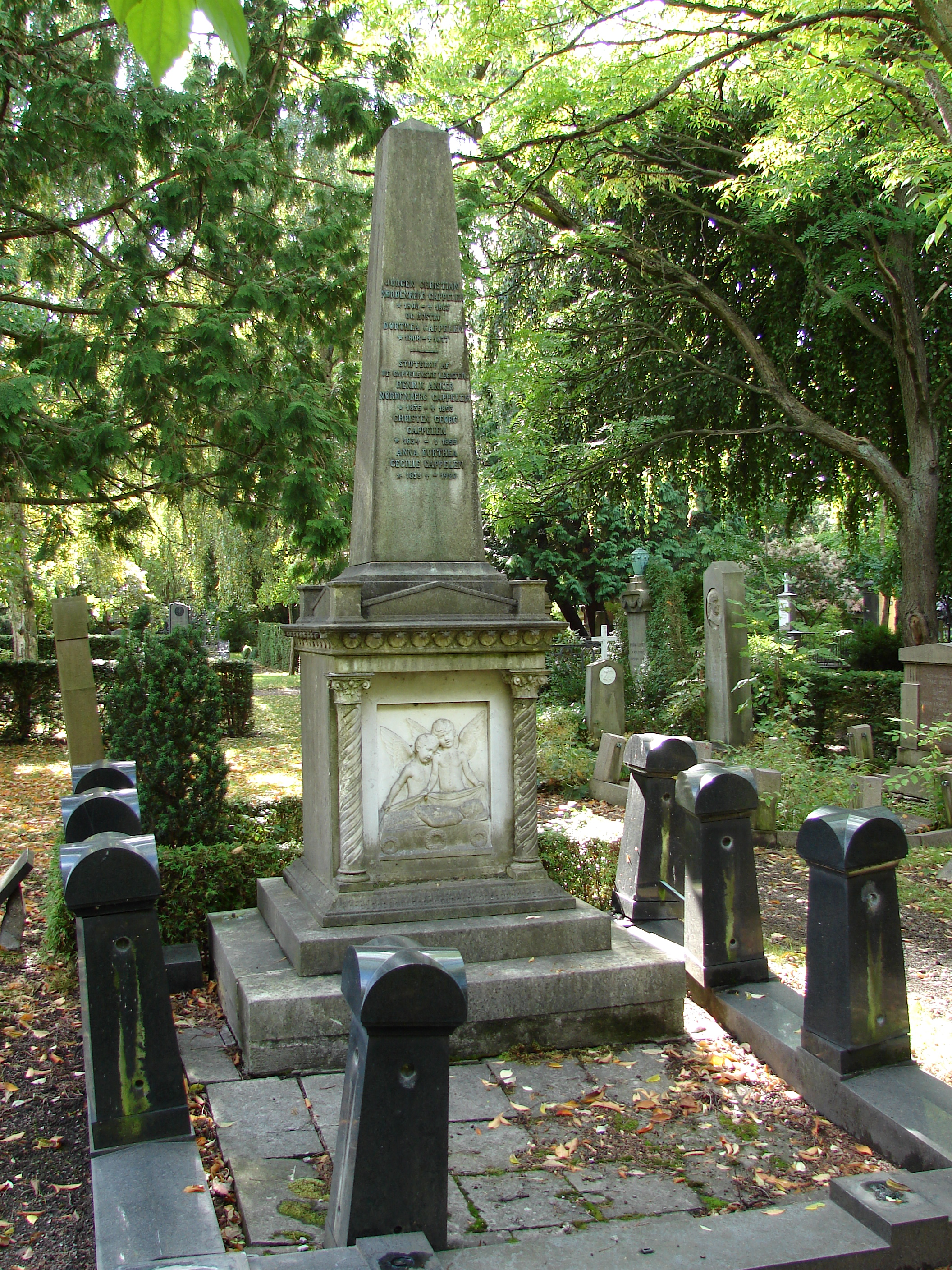 Gravminde for Jørgen Christian Nordenberg Cappelen (1805–1863) og Hustru Dorthea Cappelen (1808–1877). Stifterne af De Cappelenske Legater Henrik Anker Nordenberg Cappelen (1835–1893), Christen Georg Cappelen (1834–1895), Anna Dorthea Cecilie Cappelen (1893–1920), Assistens Kirkegård, Nørrebro, København